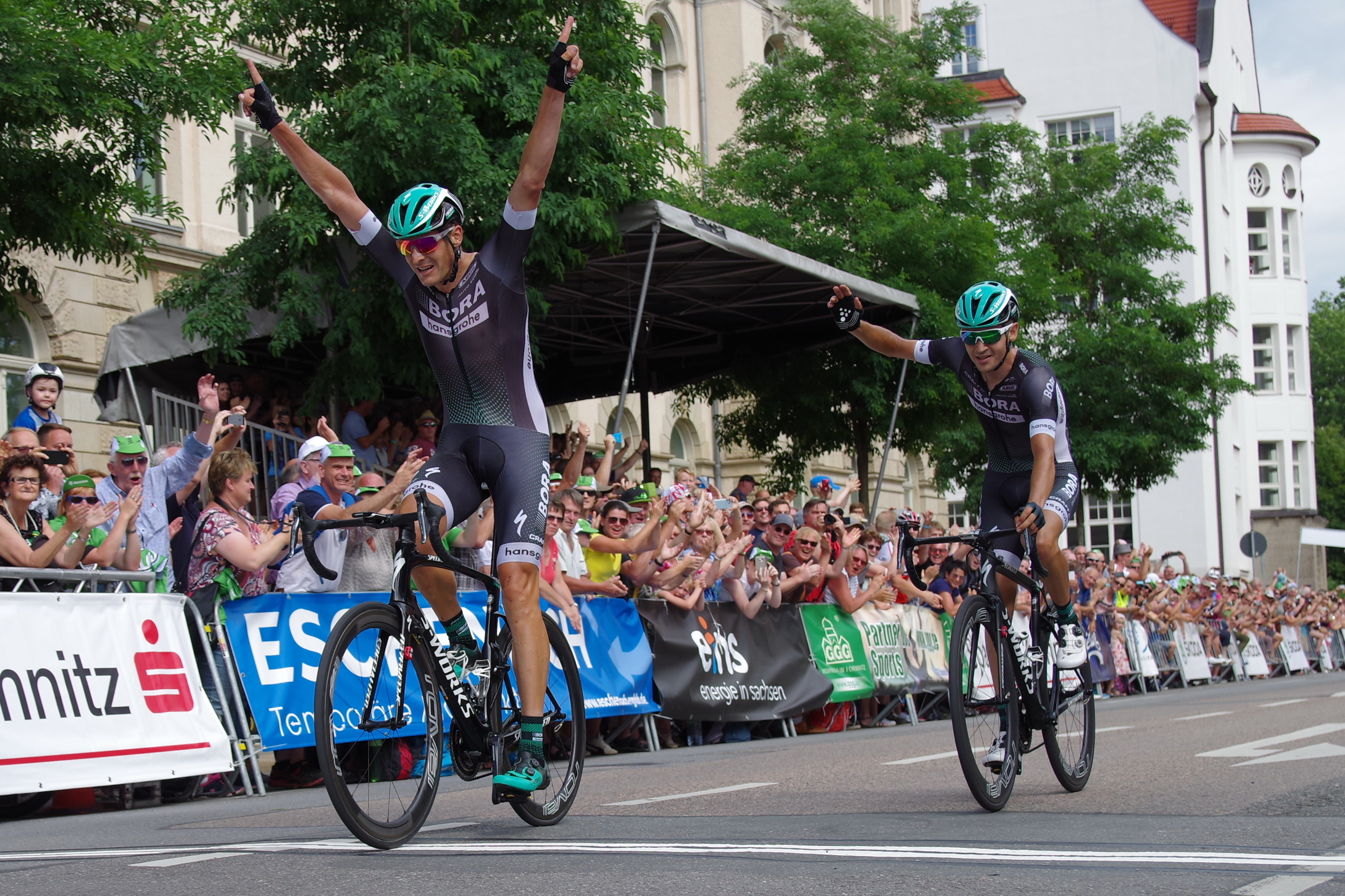 Deutsche Meisterschaften im Straßenrennen 2017 (Männer) 25. Juni 2017 Zieleinfahrt Marcus Burghardt vor Emanuel Buchmann The making of this document was supported by the Community-Budget of Wikimedia Germany.